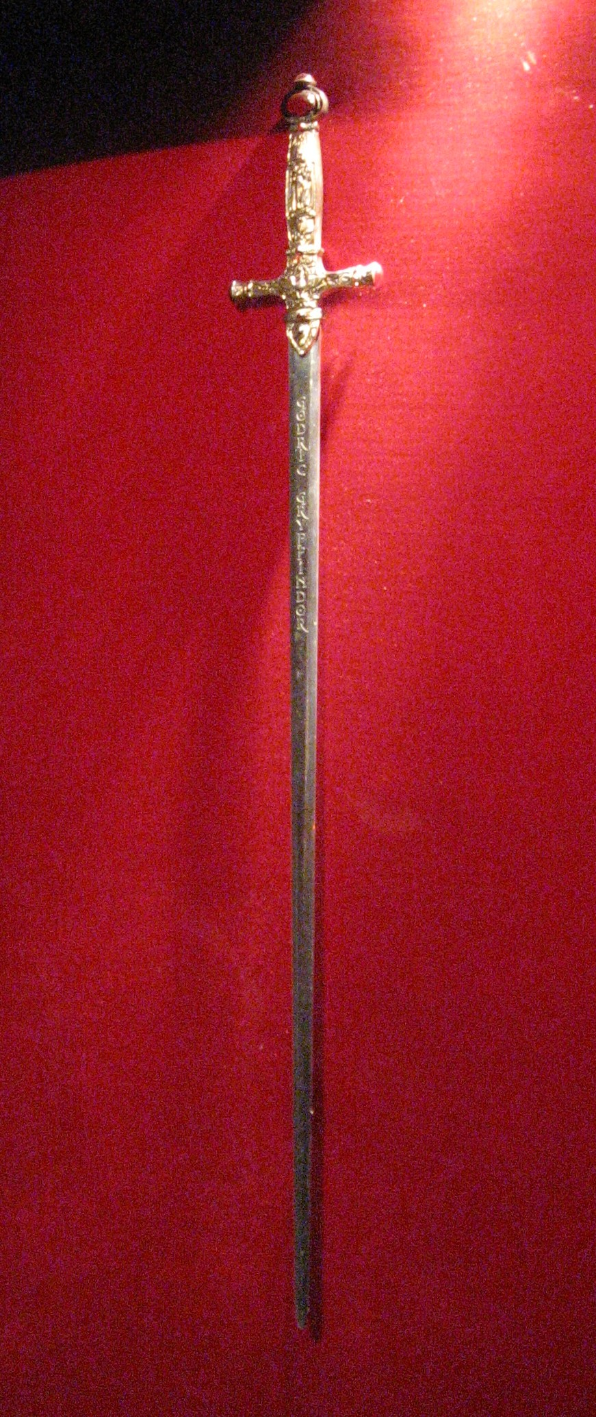 Epée de Gryffondor, Harry Potter Exhibition, Cité du Cinéma, Saint Denis (Paris) avril 2015